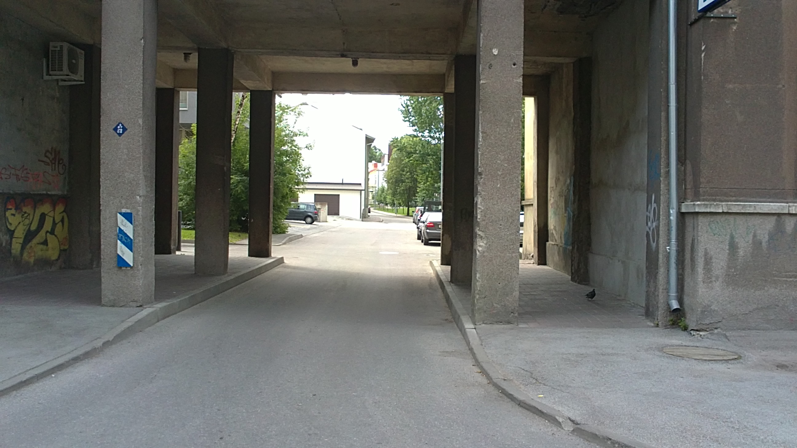 Allika tänav Tallinnas, vaade Kentmanni tänavalt